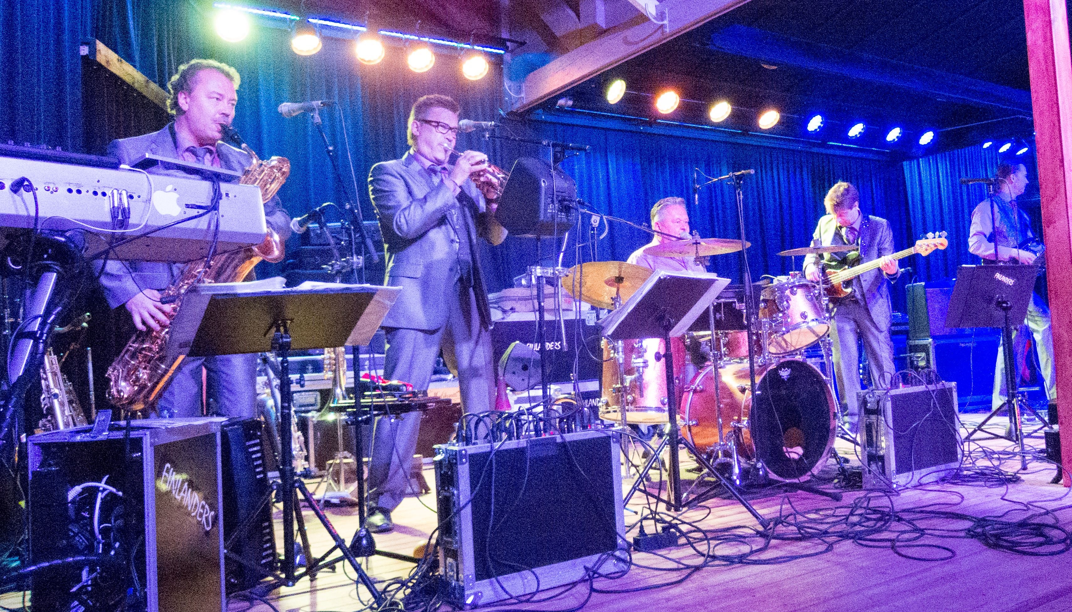 Finlanders suomalaine tanssiyhtye